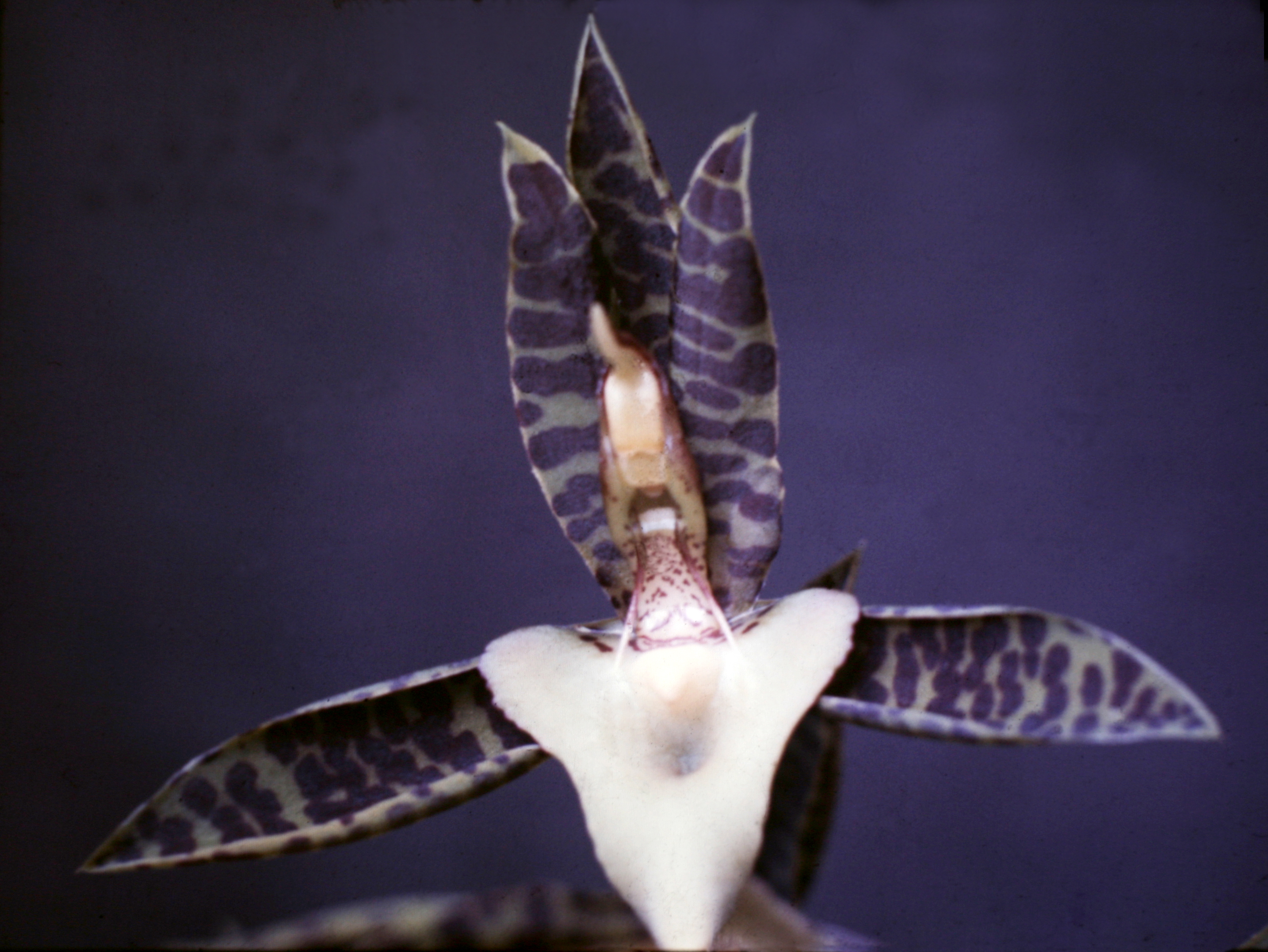 Catasetum deltoideum, Suriname.